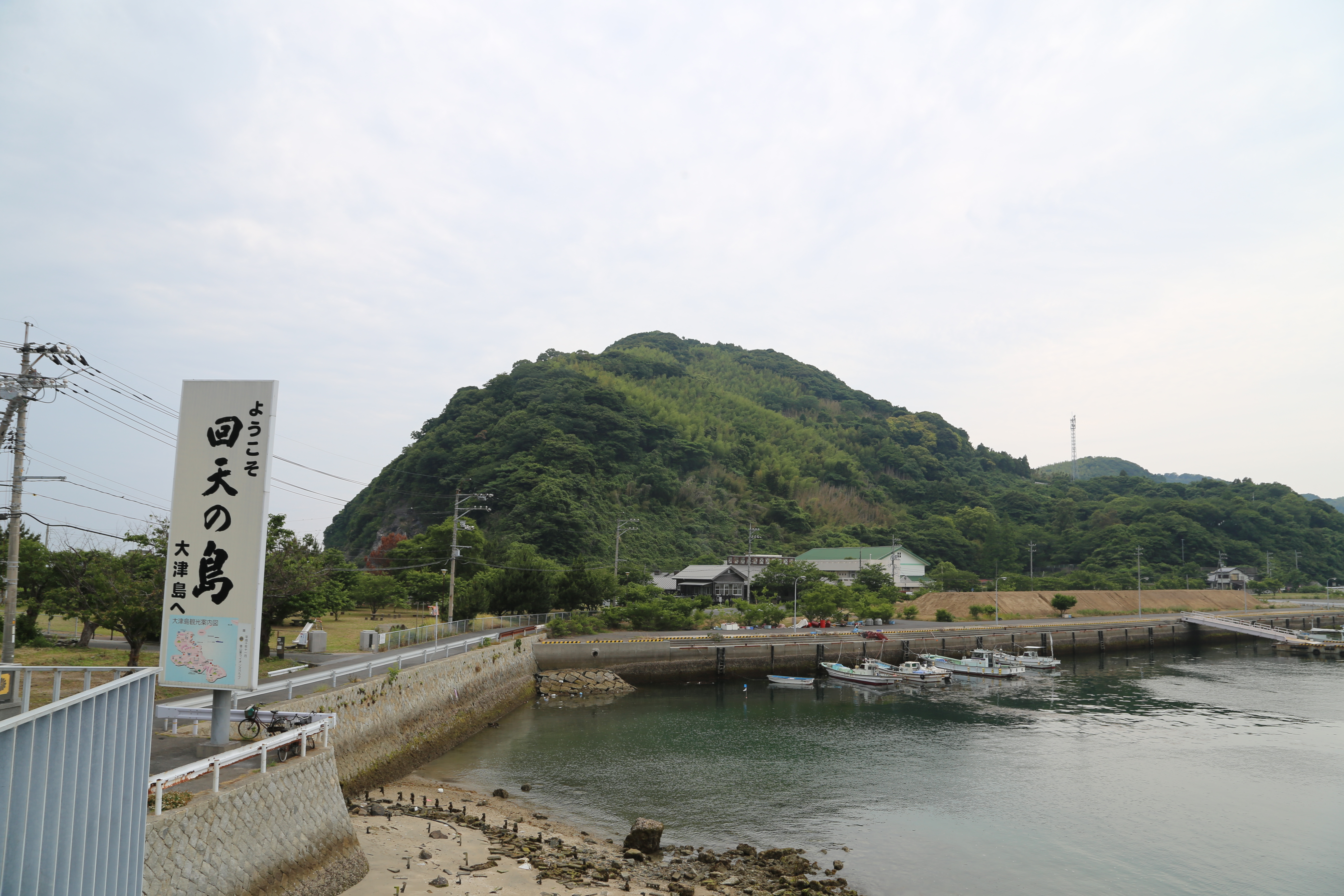 大津島港から大津島ふれあいセンター（戦前は回天の基地となっていた）を眺める